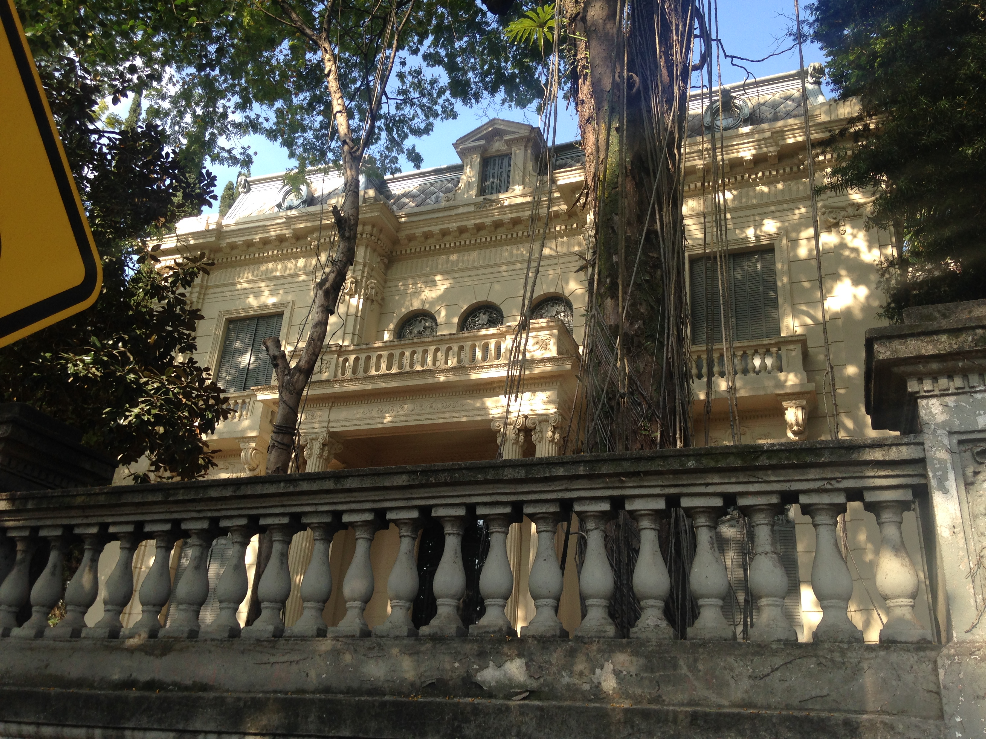 Fachada da Residência da Família Jafet, na Rua Bom Pastor, 825, em São Paulo (SP), Brasil.